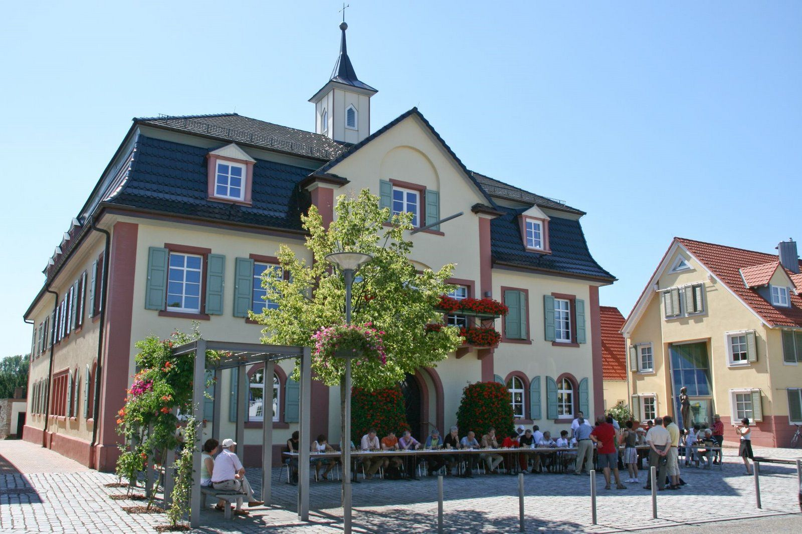 Rathaus Muggensturm, Simultanschachturnier 01. August 2009